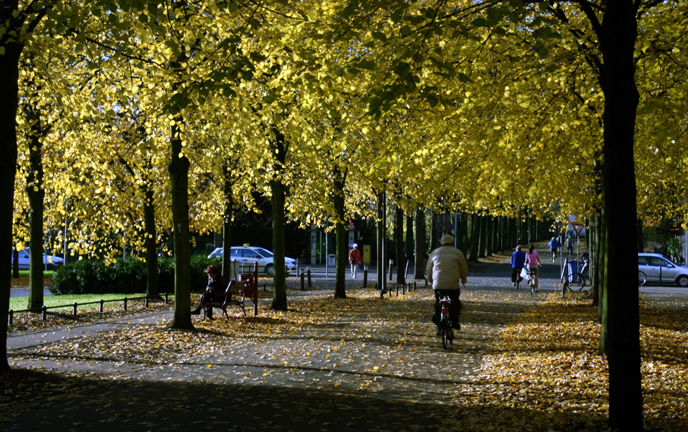 Die Promenade in Münster in der Nähe der Salzstraße